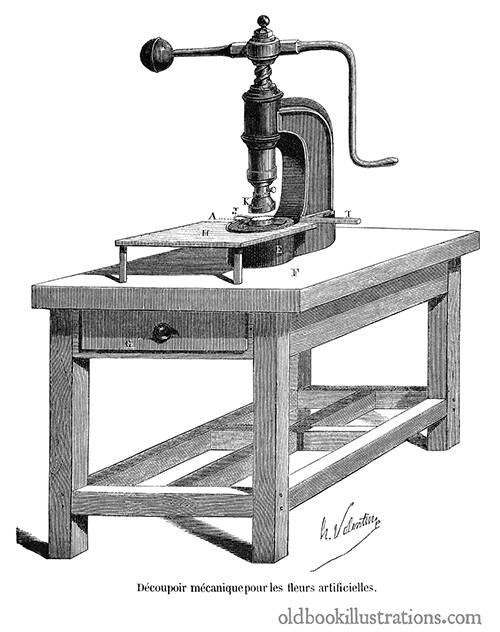 Udstandning af kunstige blomster.